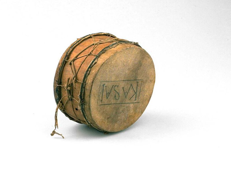 Slaginstrument. Dubbelvellige cilindrische trom Unknown language: Marwas